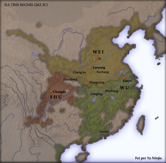 Els Tres Regnes en el 262, en vigílies de la conquesta de Shu per Wei.